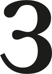 Omgekeerde epsilon